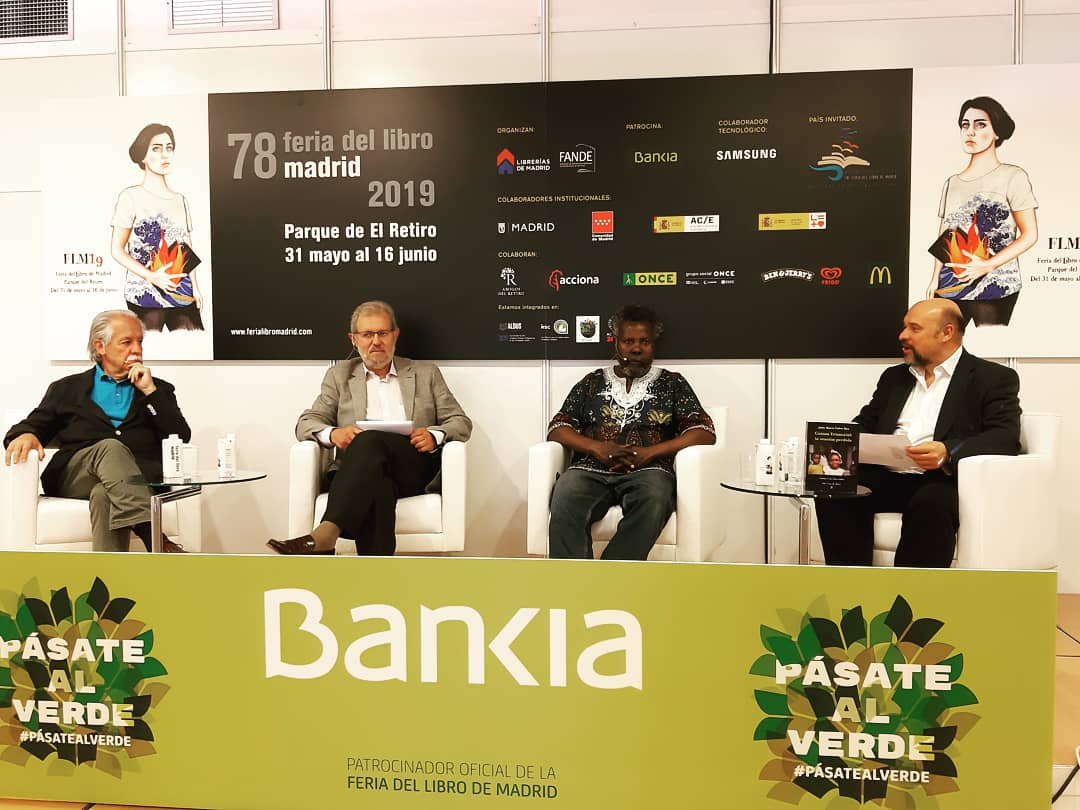 Presentación de libro del Grupo Editorial Sial Pigmalion en la Feria del Libro de Madrid 2019